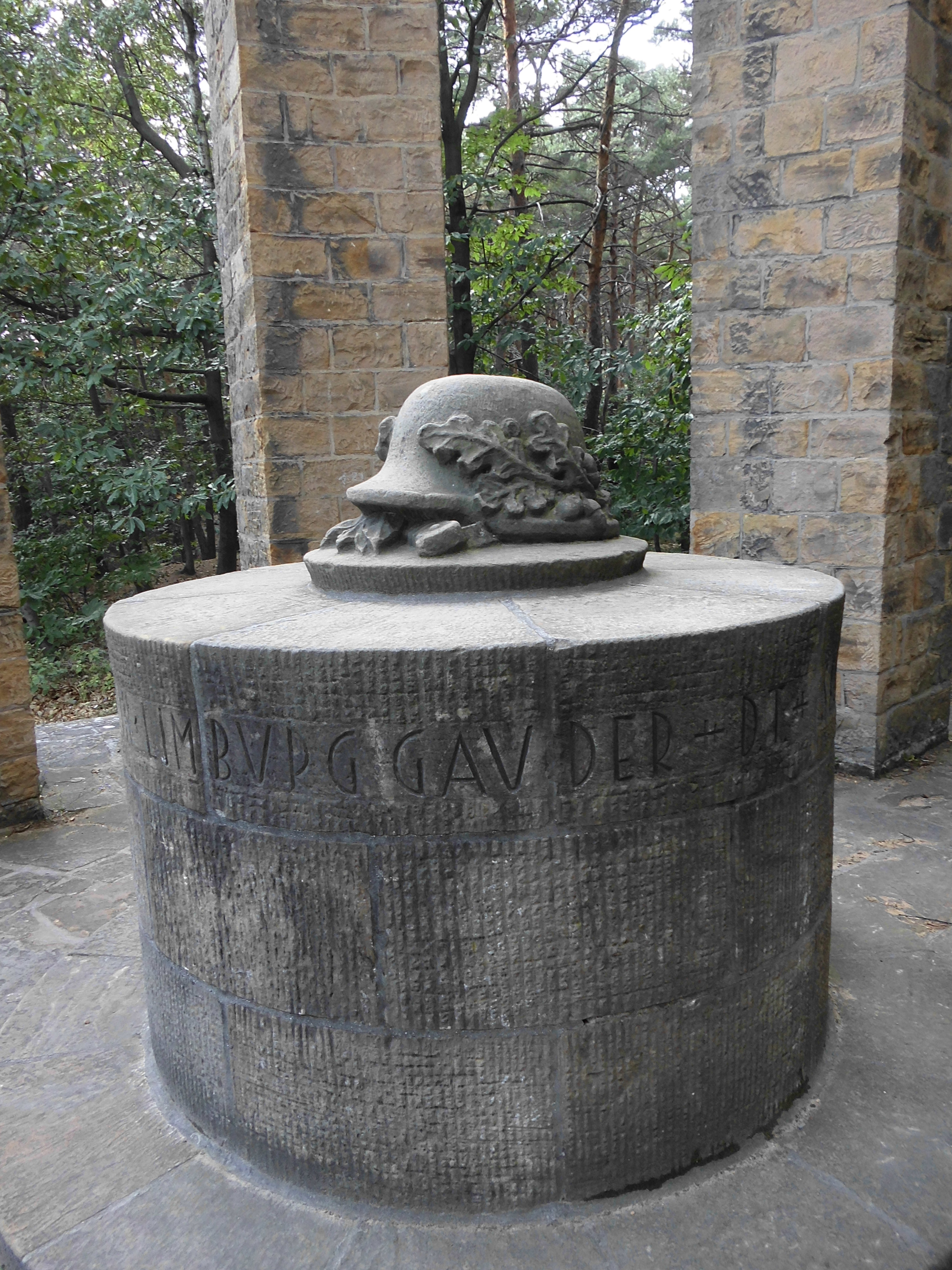 Turnerehrenmal Deidesheim